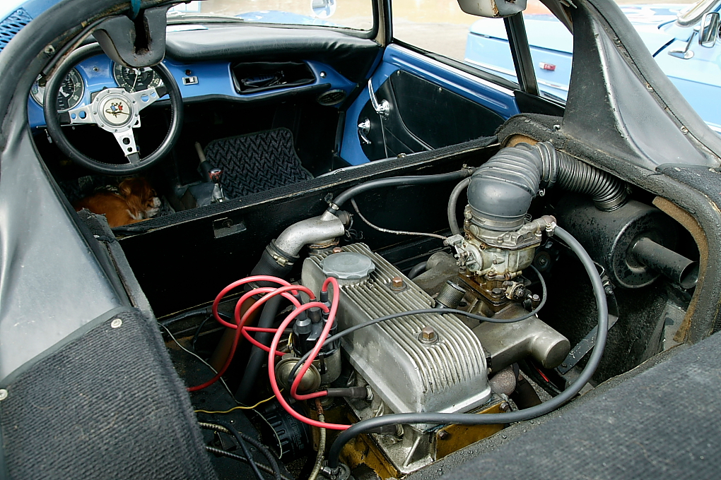 Matra-Bonnet D`Jet 5 S Engine